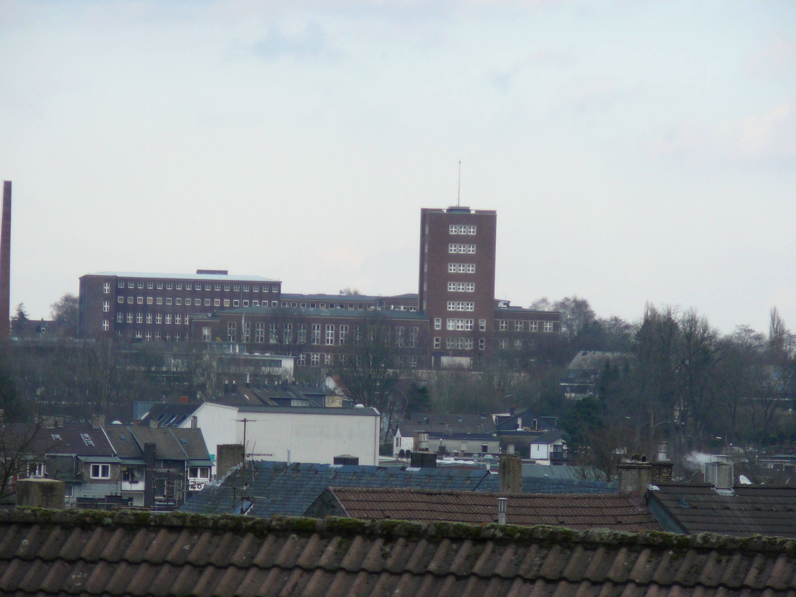 Schniewind´sche Park, Wuppertal